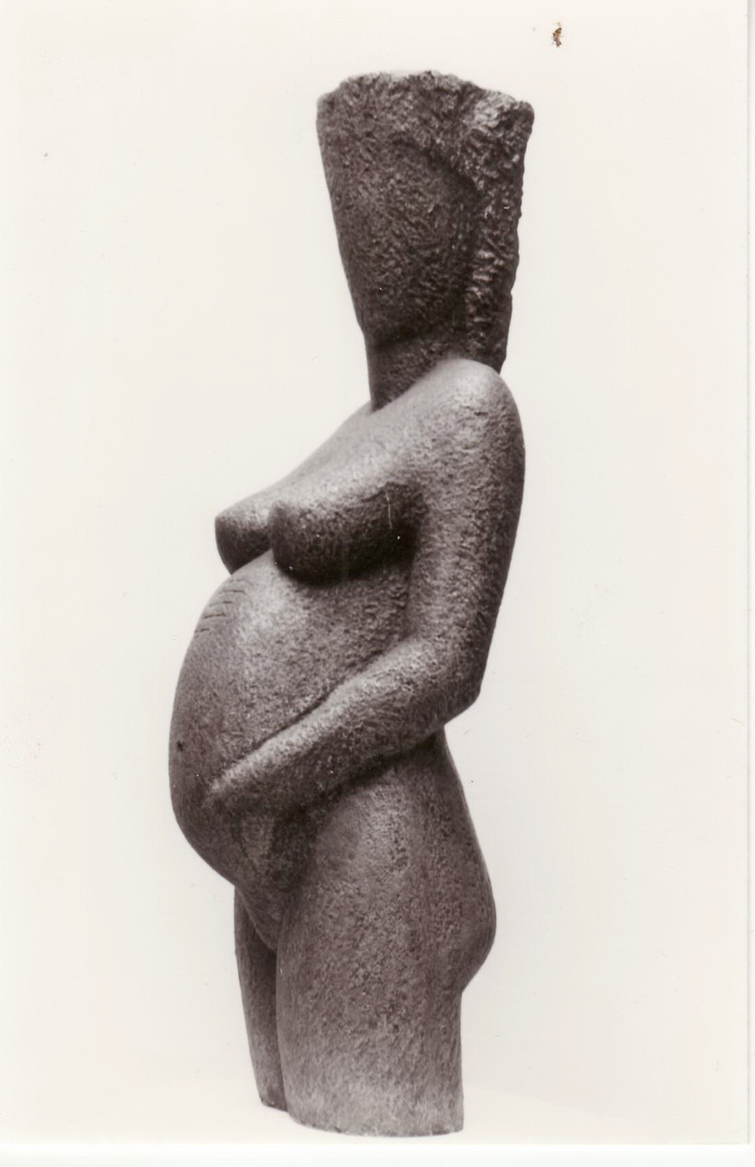 Femme enceinte (lave de Volvic) par le sculpteur Achiam